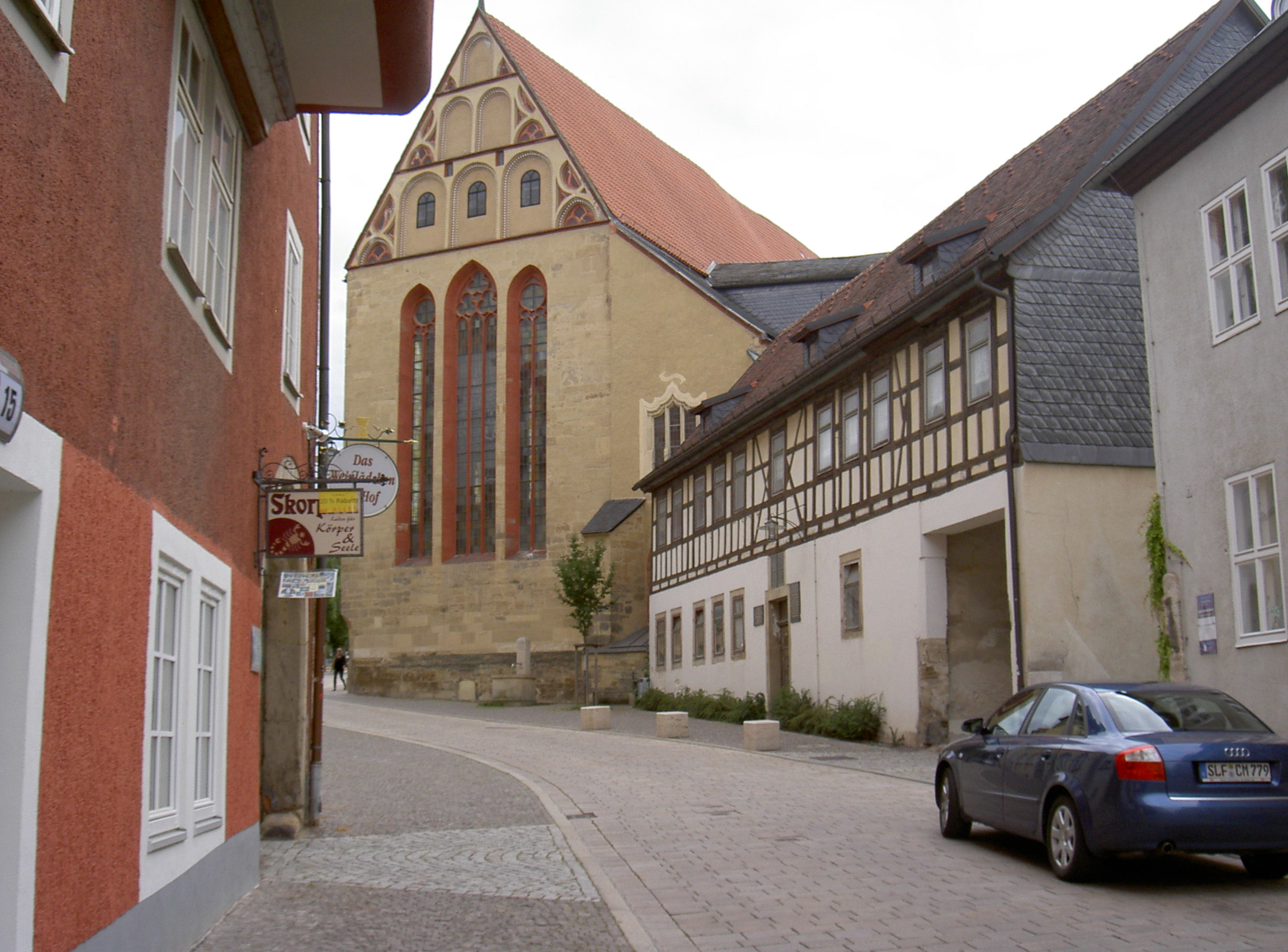 Saalfeld Brudergasse 22 und Haus Münzplatz 5